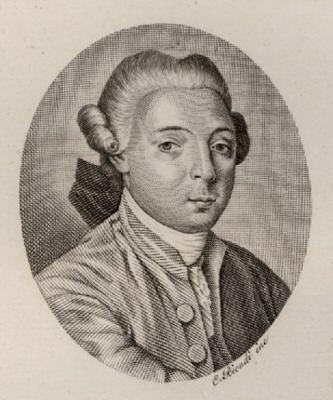 Niccolò Andria